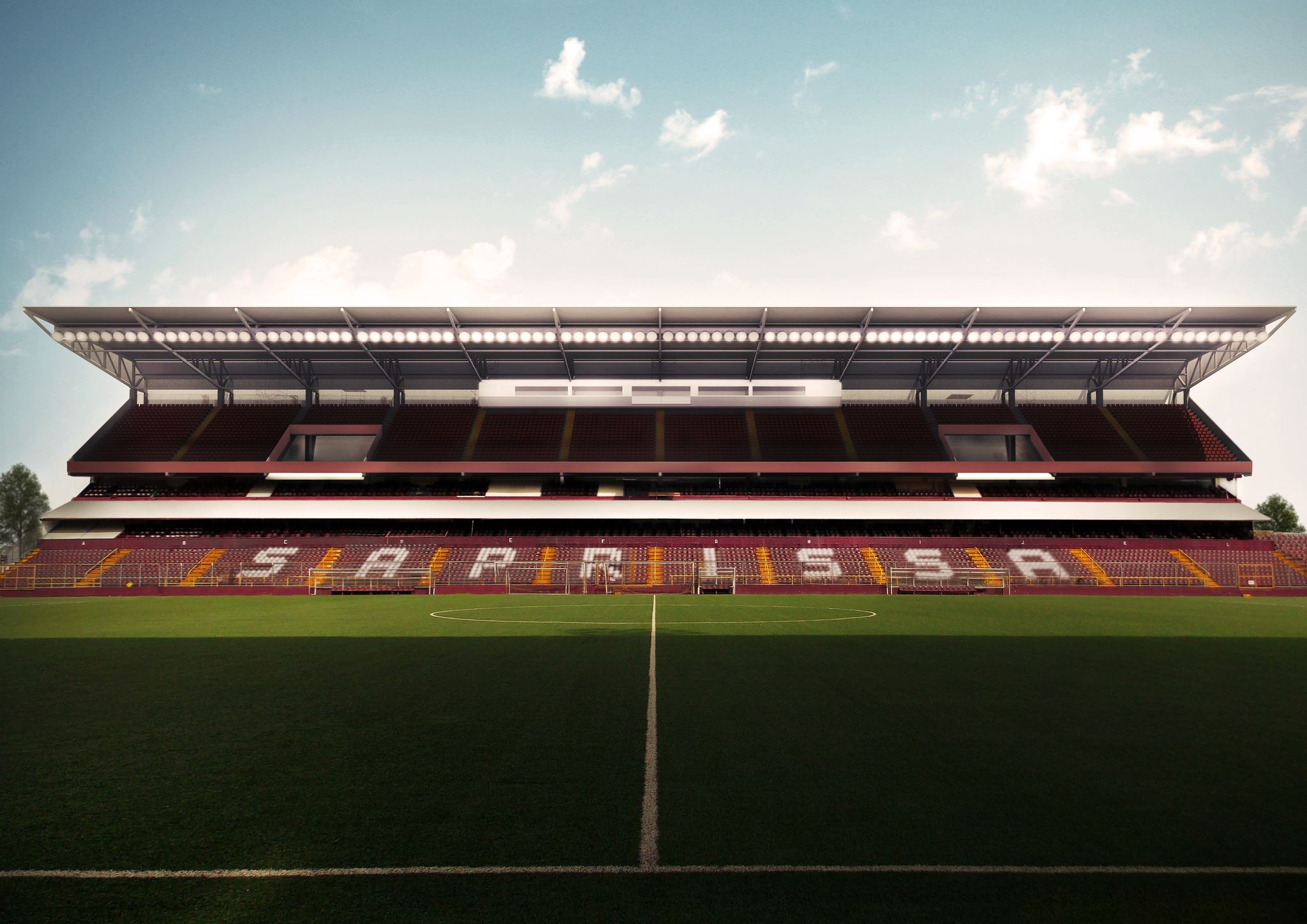 Joven arquero tico que actualmente milita en el Deportivo Saprissa